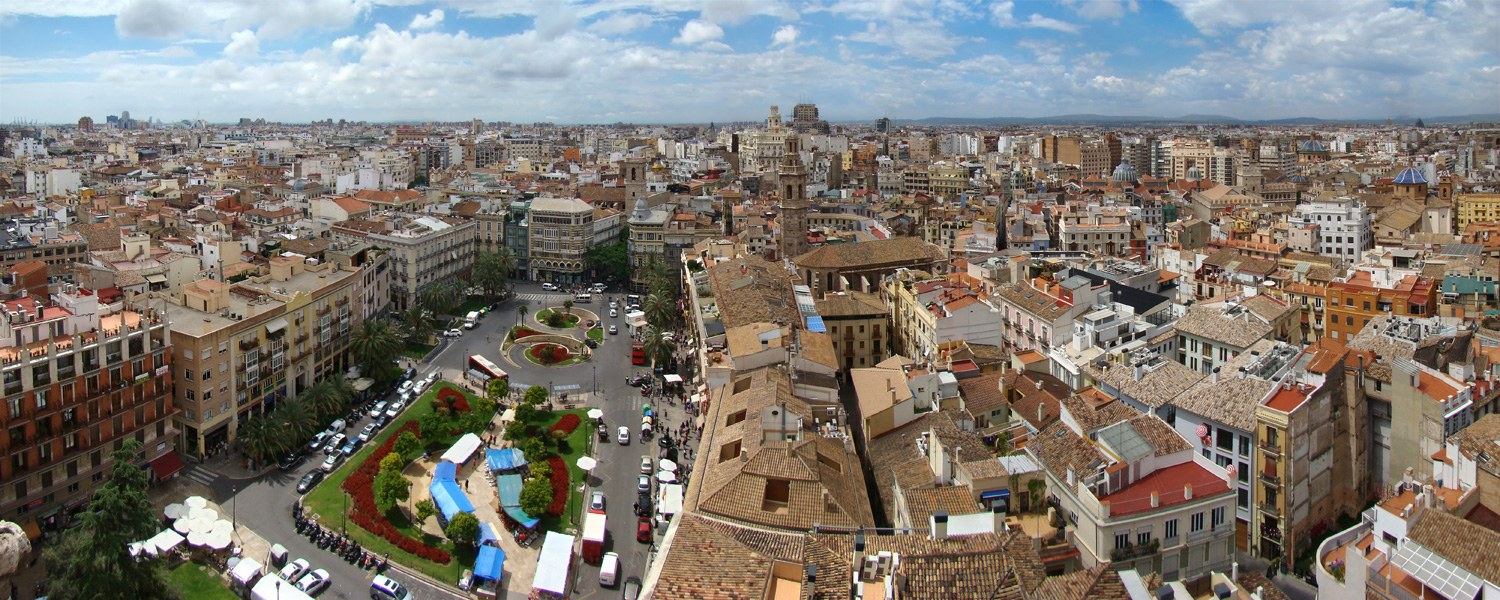 València, País Valencià, Espanya.